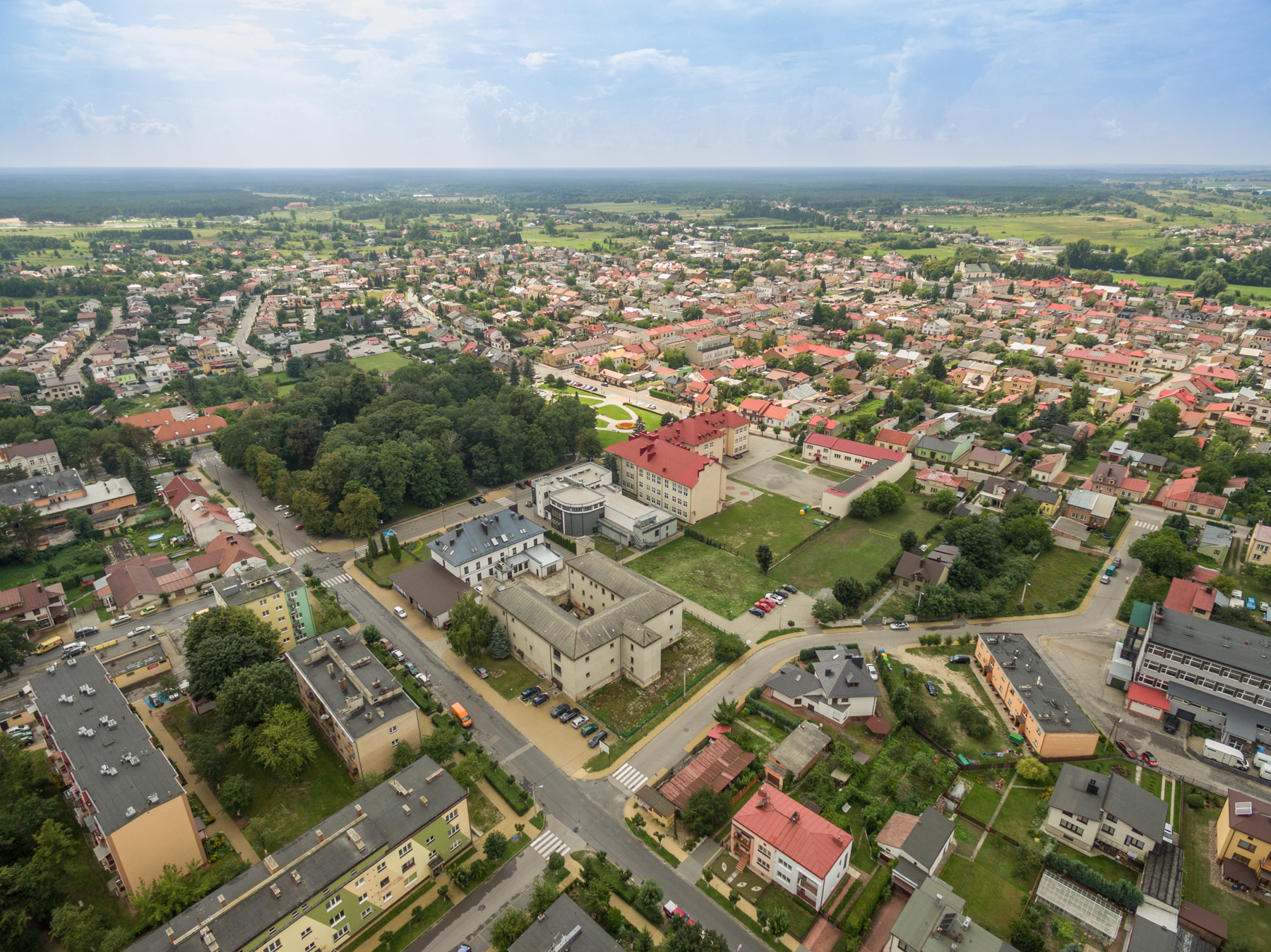 Blick auf das Stadtzentrum Janów Lubelski